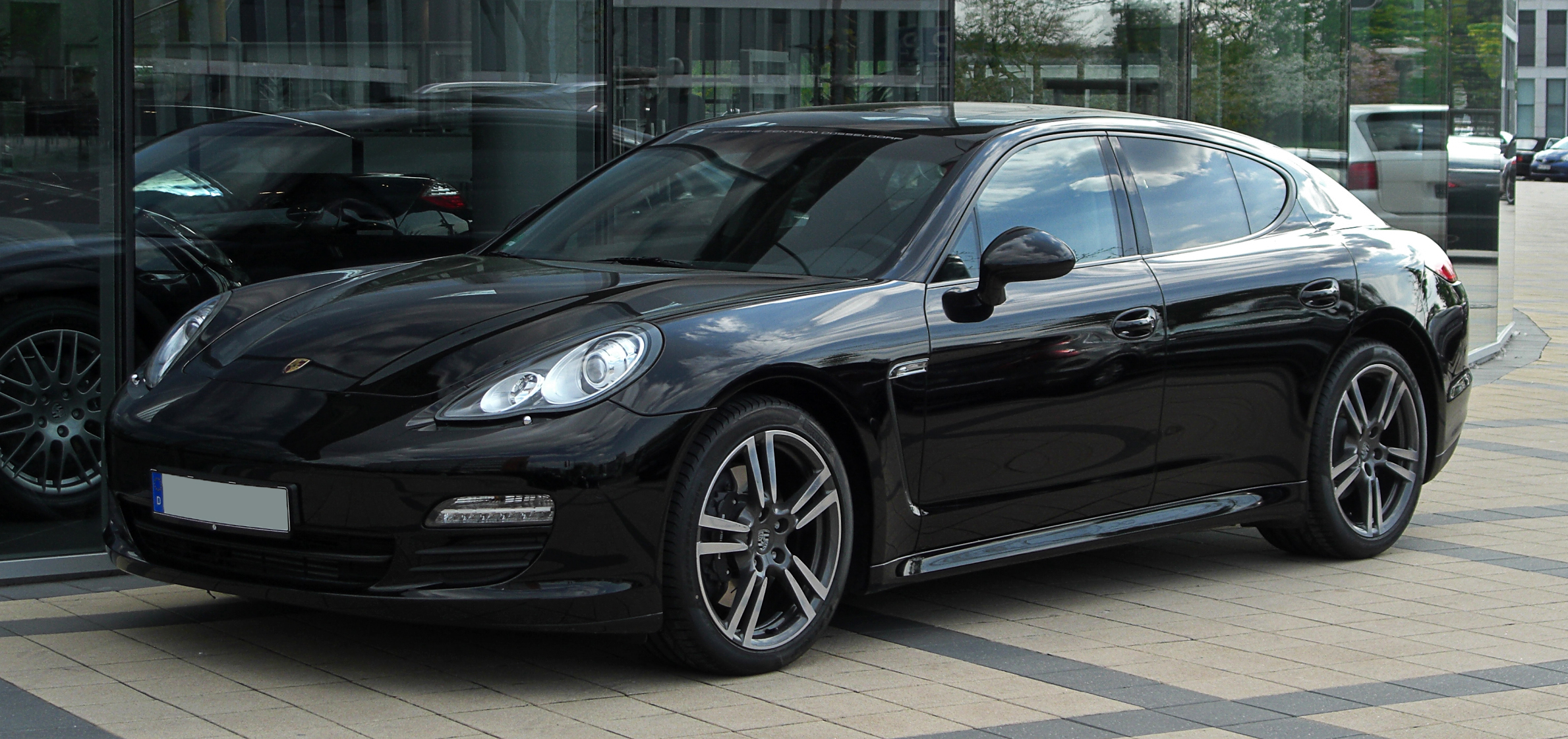 Porsche Panamera (970)